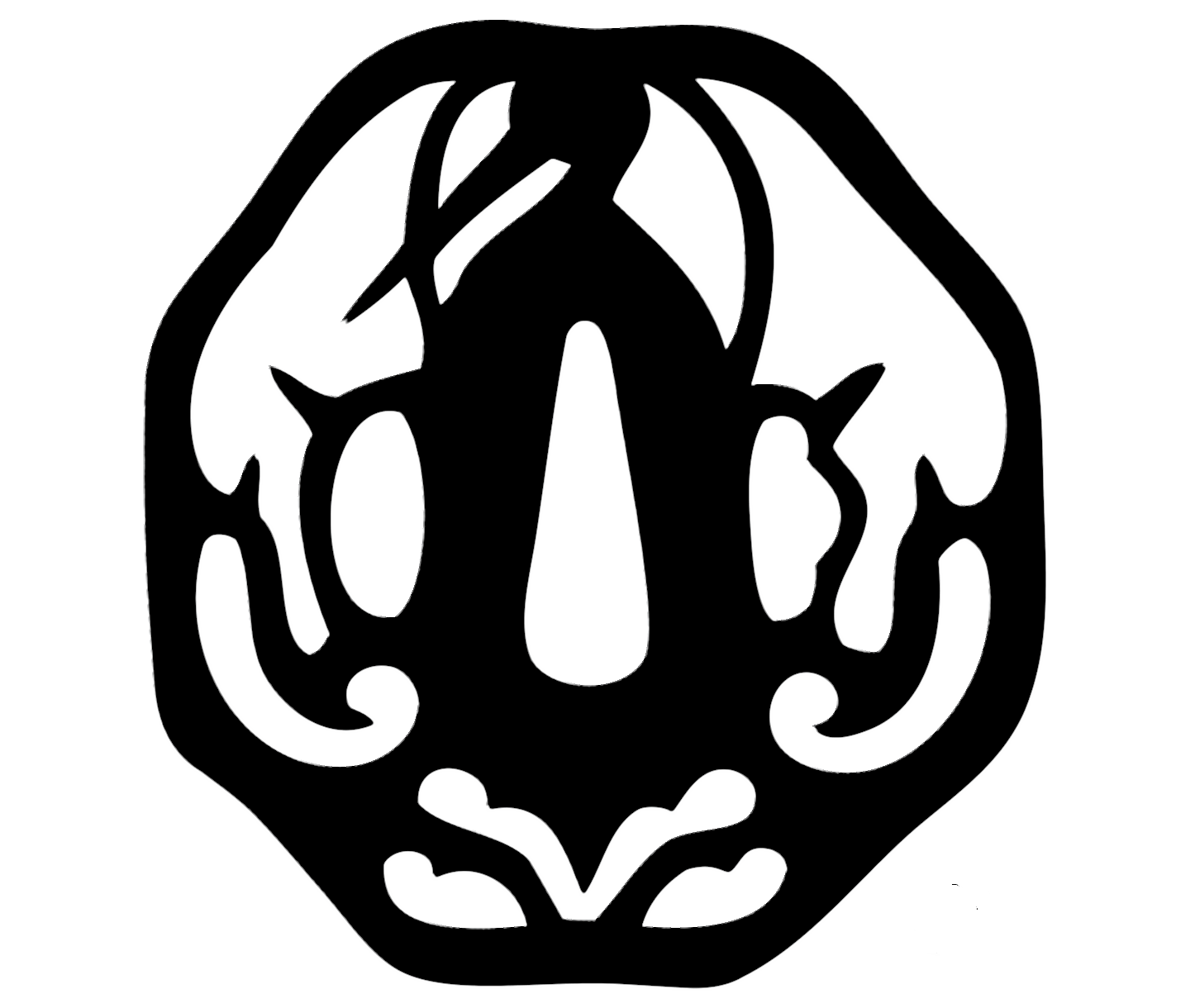 Tsuba et logo de l'Aïkibudo